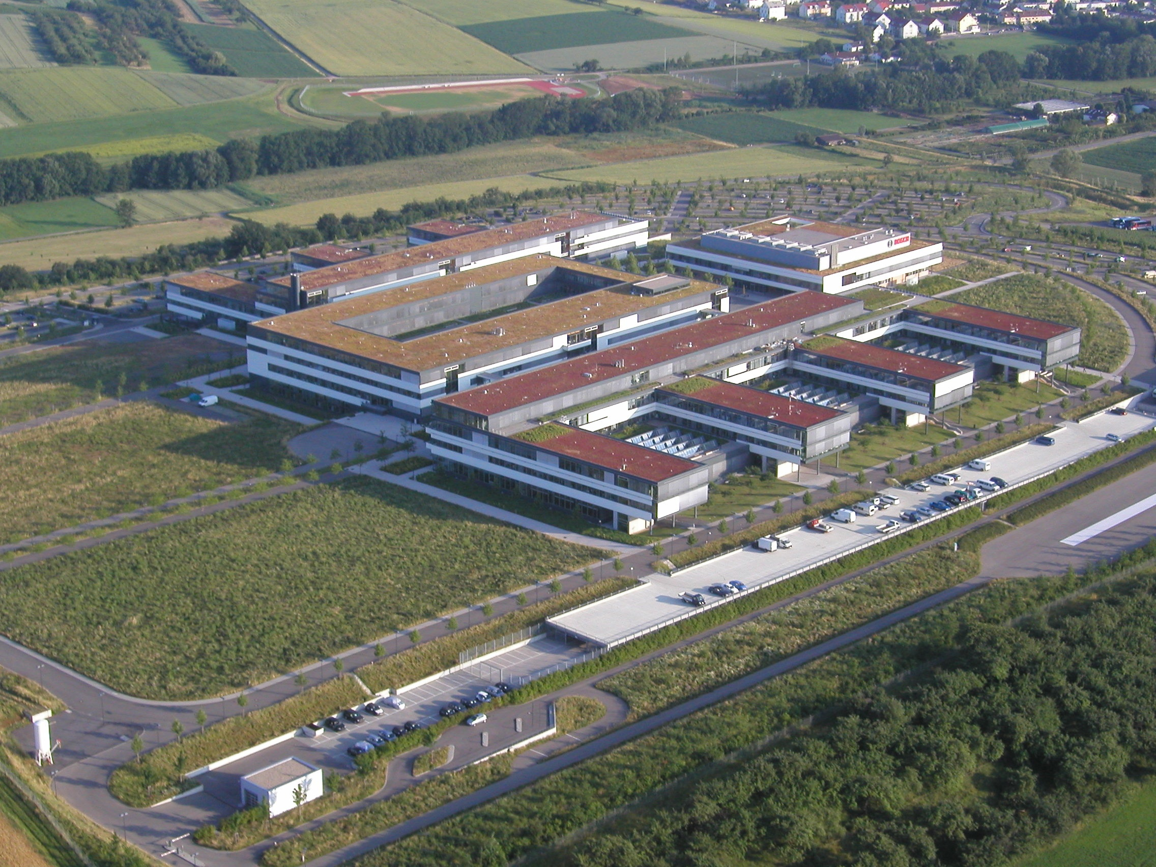 Luftbild des Entwicklungsstandortes Abstatt der Firma Robert Bosch GmbH